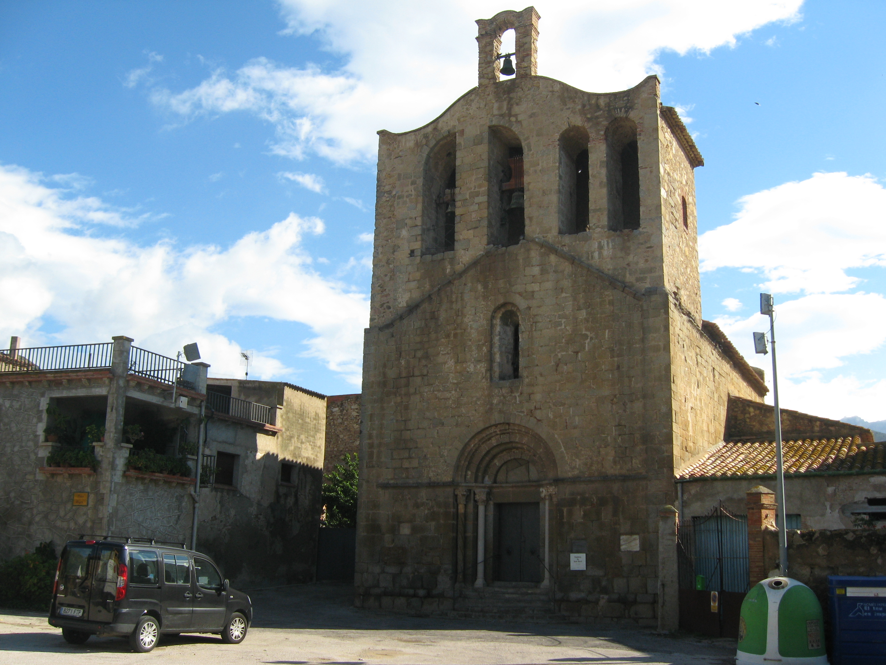 Kirche Sant Marti aus dem 11.-12. Jahrhundert in Pau (Spanien/Katalonien) Datum: 24.09.2010 Urheber: Michael Pfeiffer alias Benutzer:Gordito1869 Quelle: privates Fotoarchiv des Urhebers